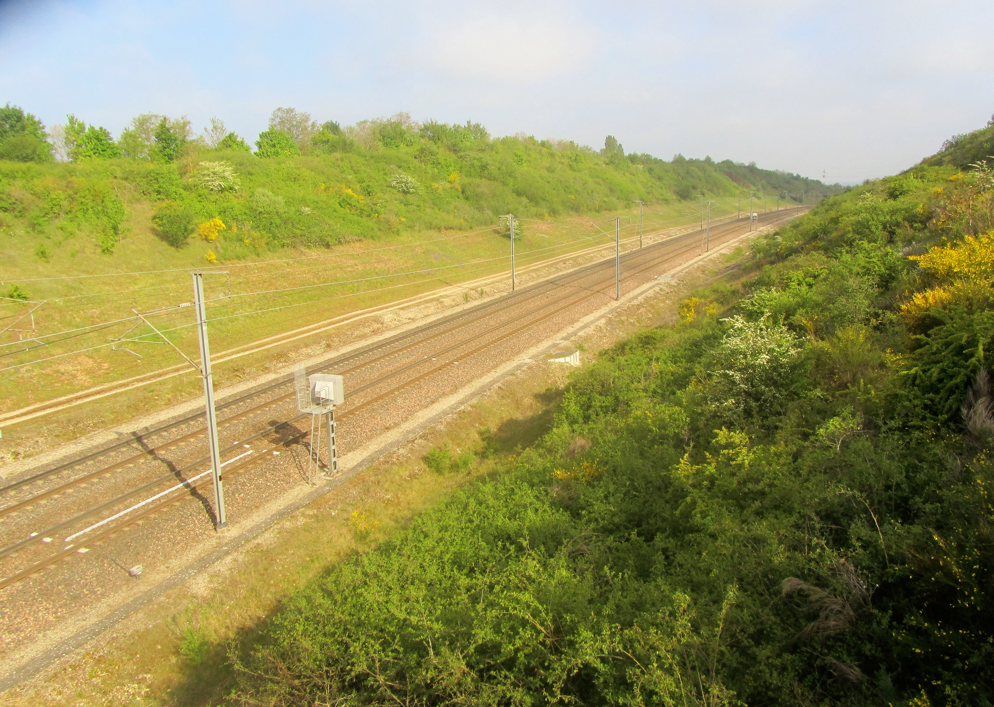 Cette tranchée du TGV a été creusée sur la voie du TGV vers Aix-Marseille (sur la commune de Grenay)